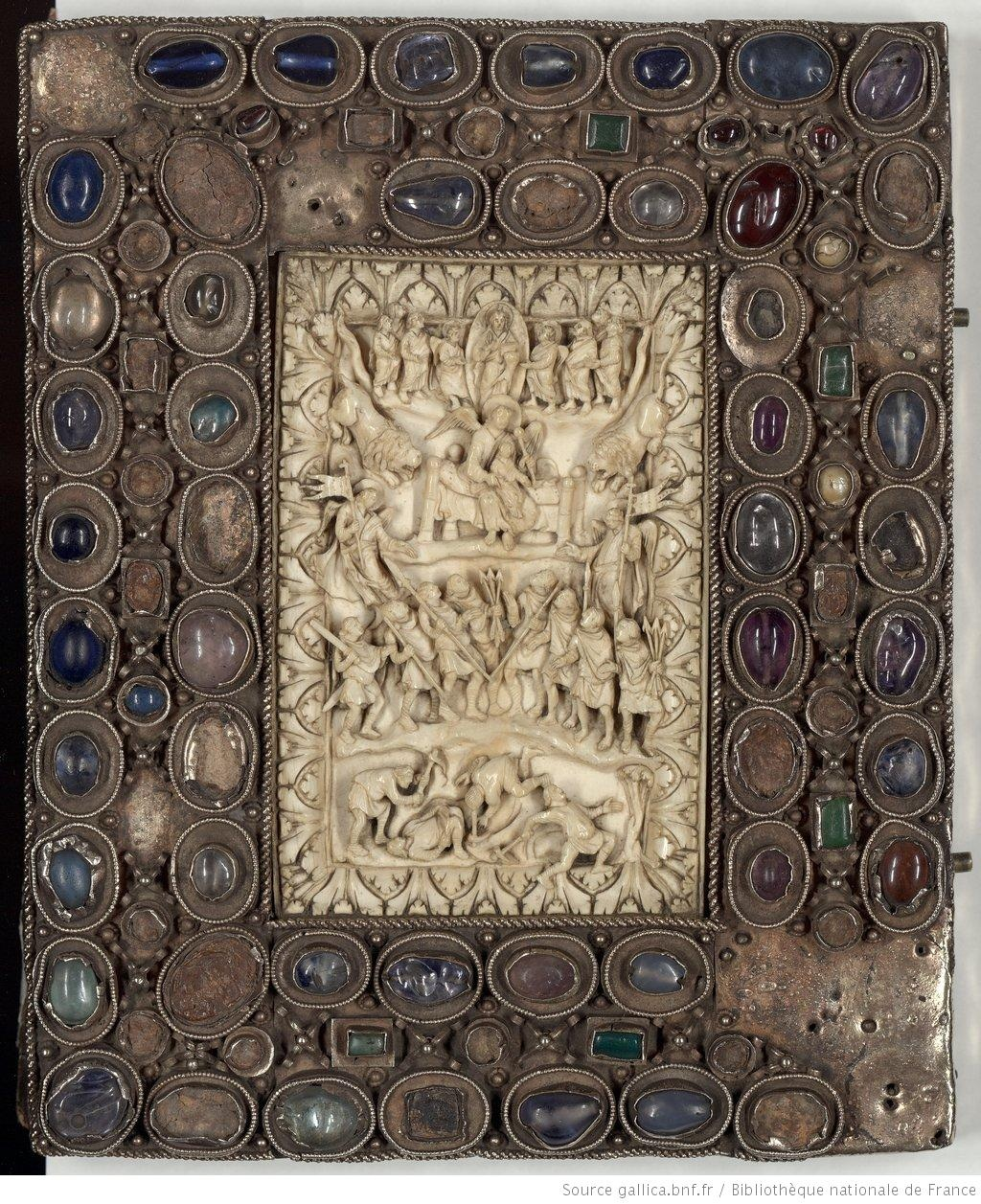 Psautier de Charles le Chauve, reliure, premier plat